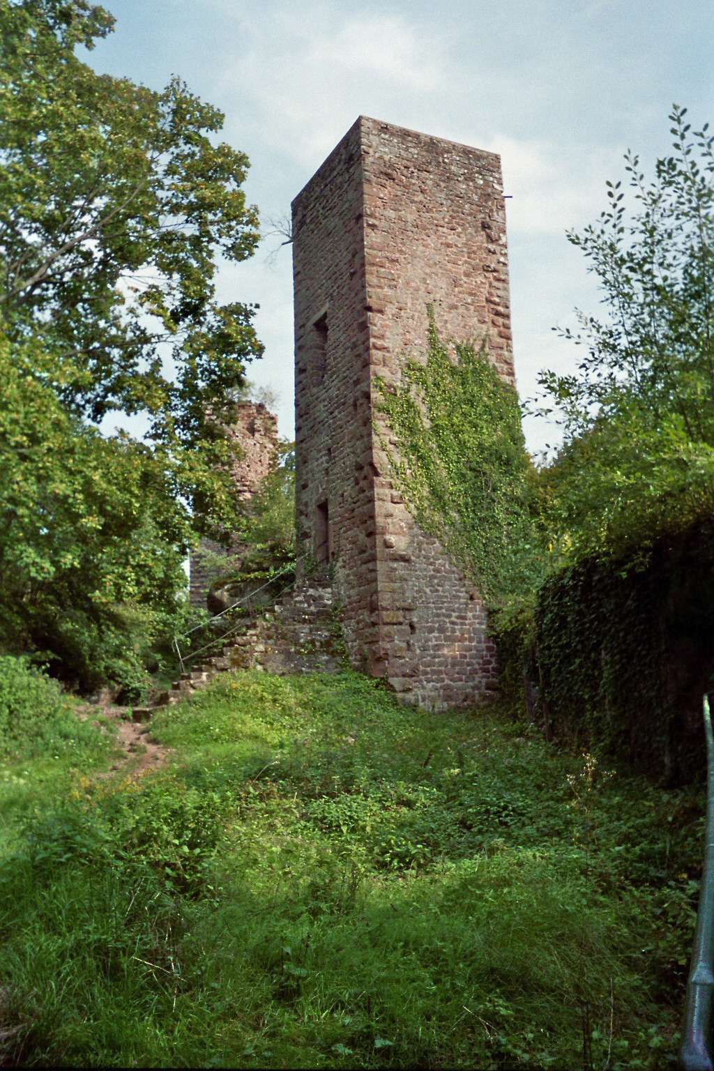 Château fort du Griffon ou de Greifenstein, aux environs de Saverne, Bas-Rhin, France. Au premier plan : Grand-Greifenstein. Au second plan : Petit-Greifenstein.